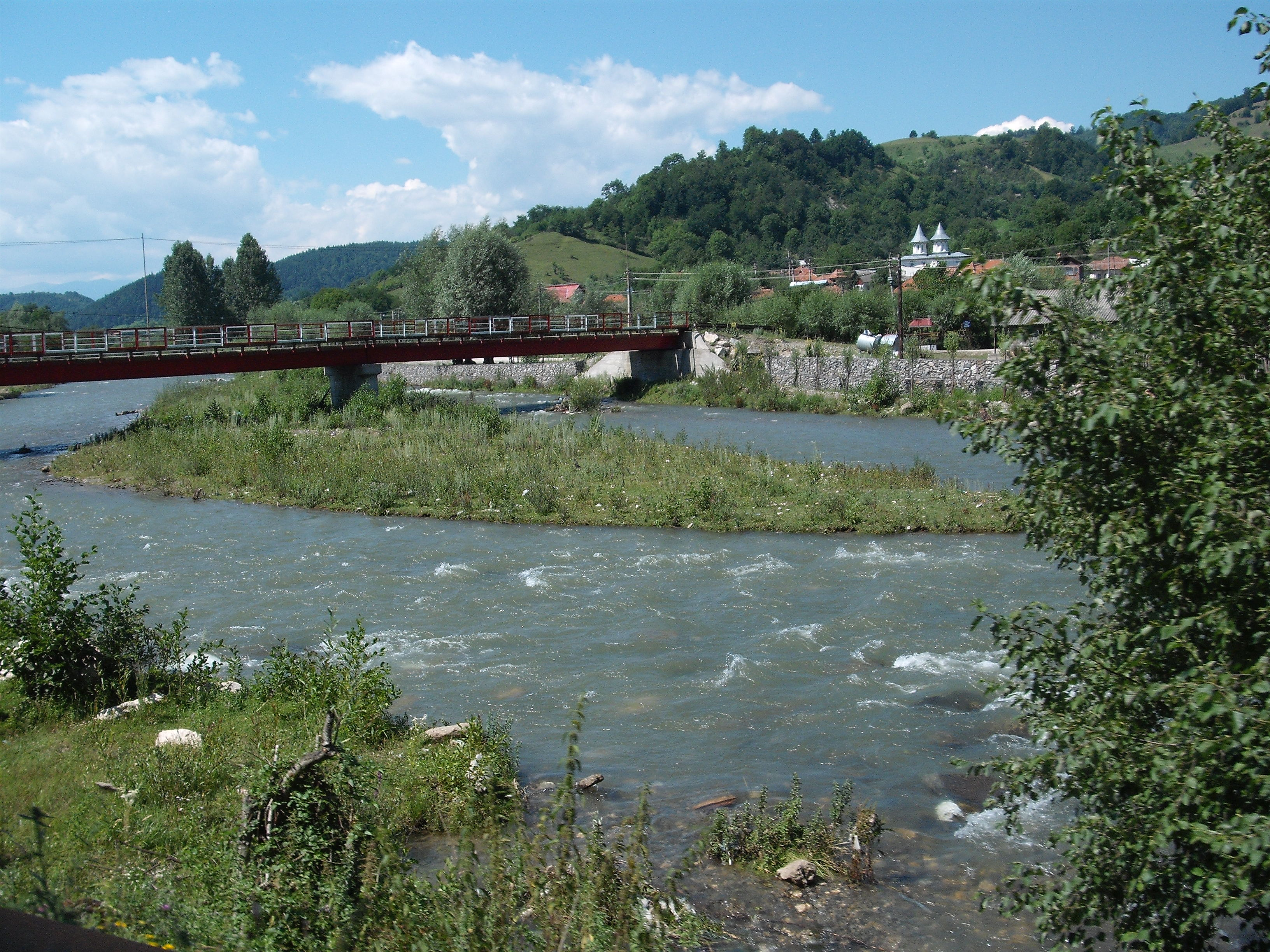 Râul Dâmboviţa lângă Malu cu Flori, Judeţul Dâmboviţa